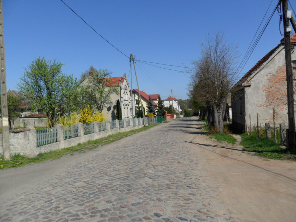 Jaromirowice koło Gubina